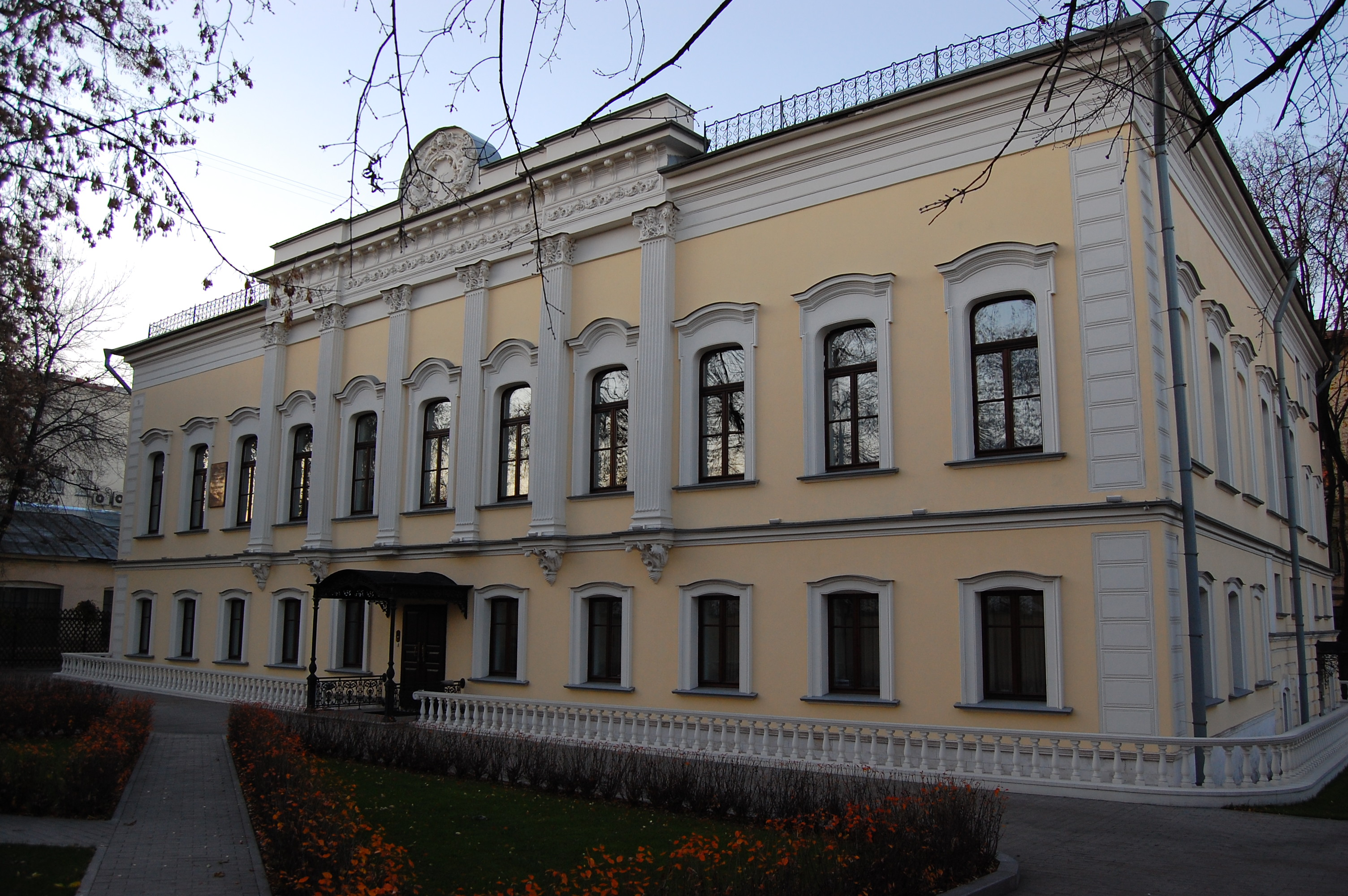 Городская усадьба А. В. Полежаевой — Зубовых